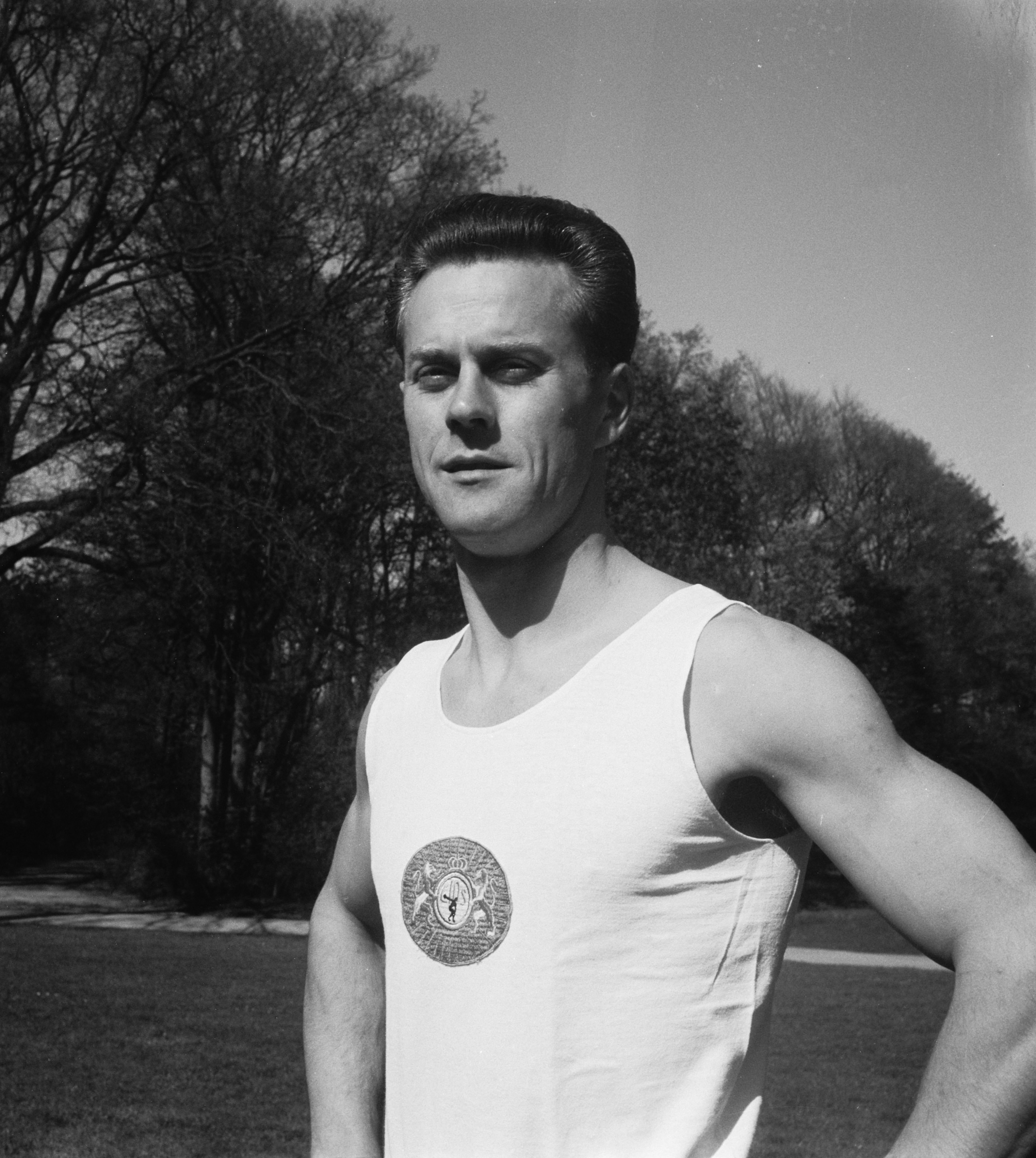 Klaas Boot olympisch atleet